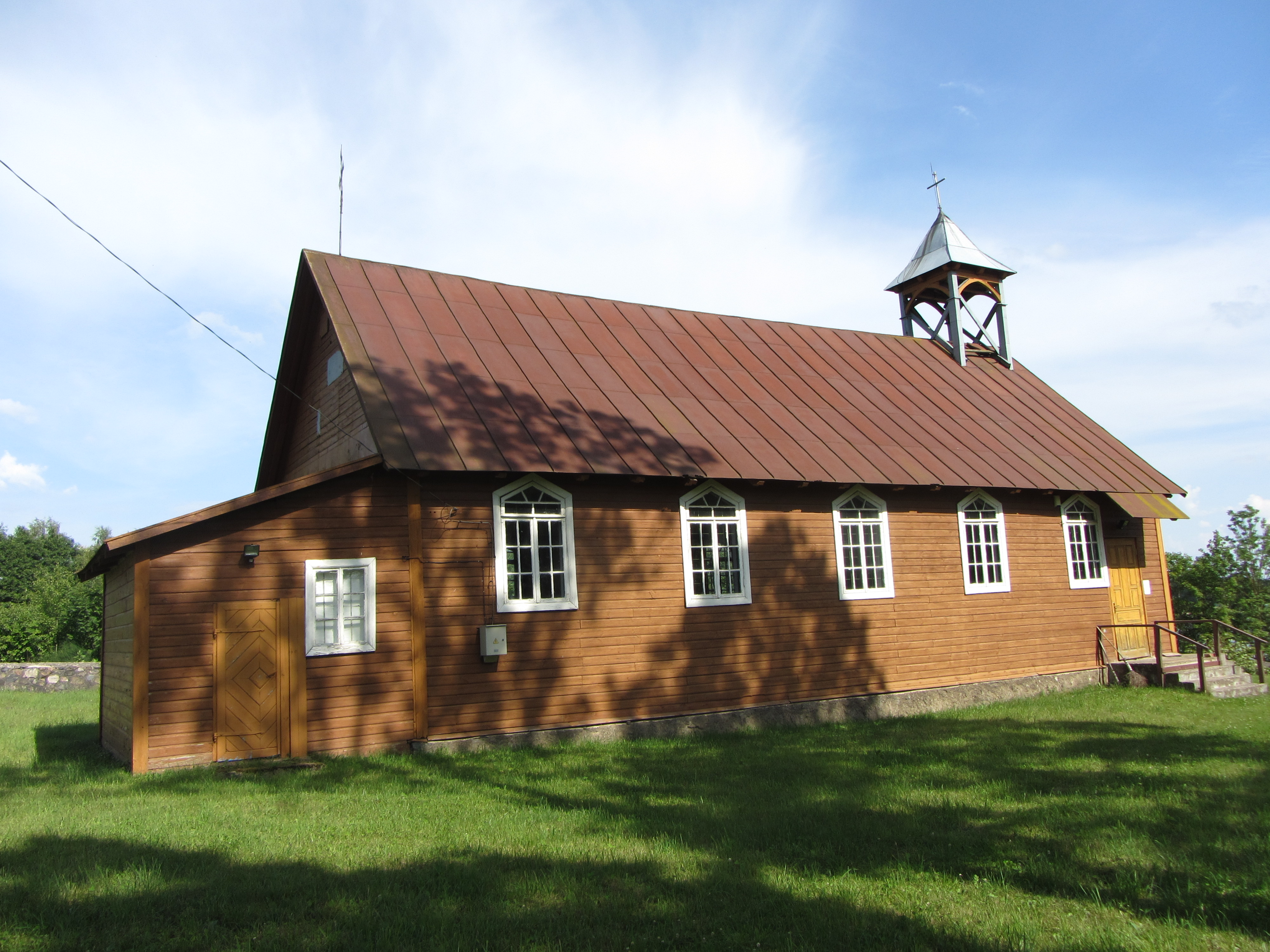 Tilžė 32200, Lithuania